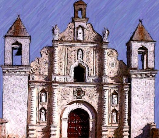 Iglesia de la Merced — Honduras.